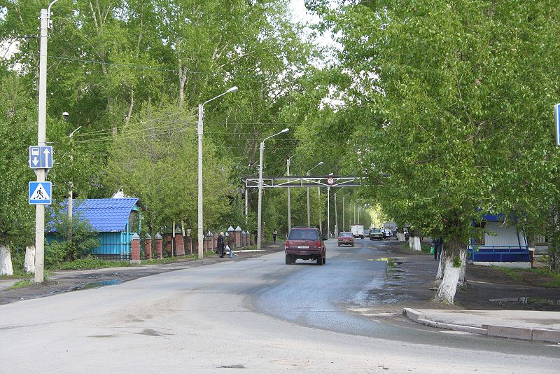 Начало улицы 5-й Армии от проспекта Ленина, г. Томск